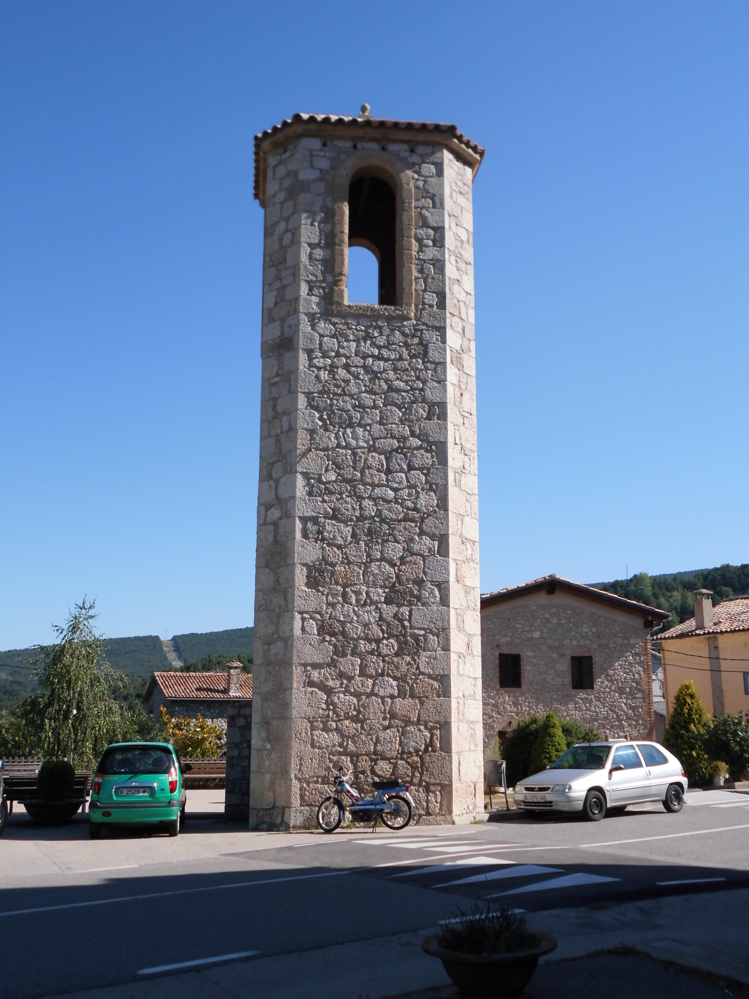 Campanar de l'església parroquial de Santa Maria (Vallcebre)